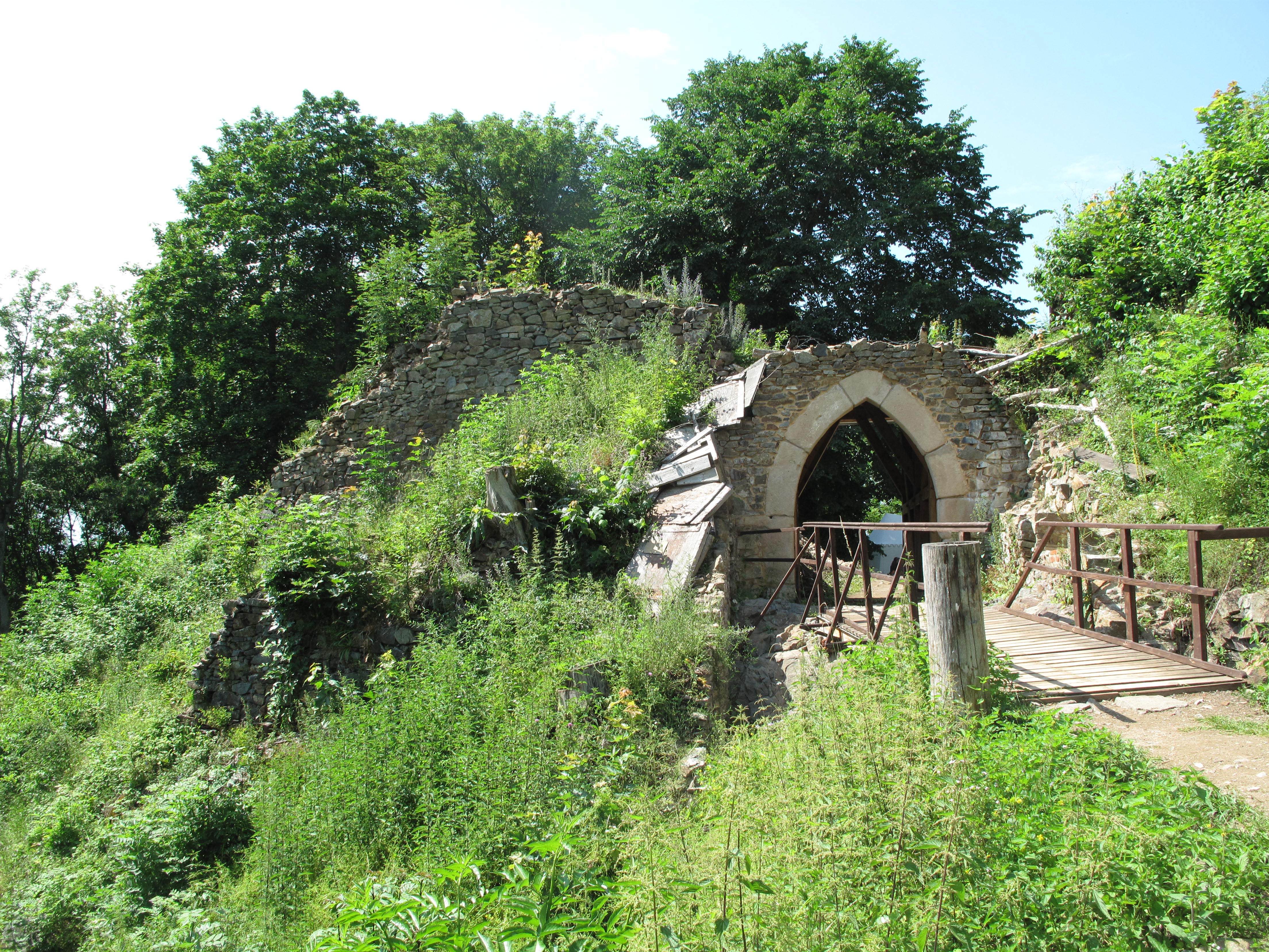 Rýzmberk